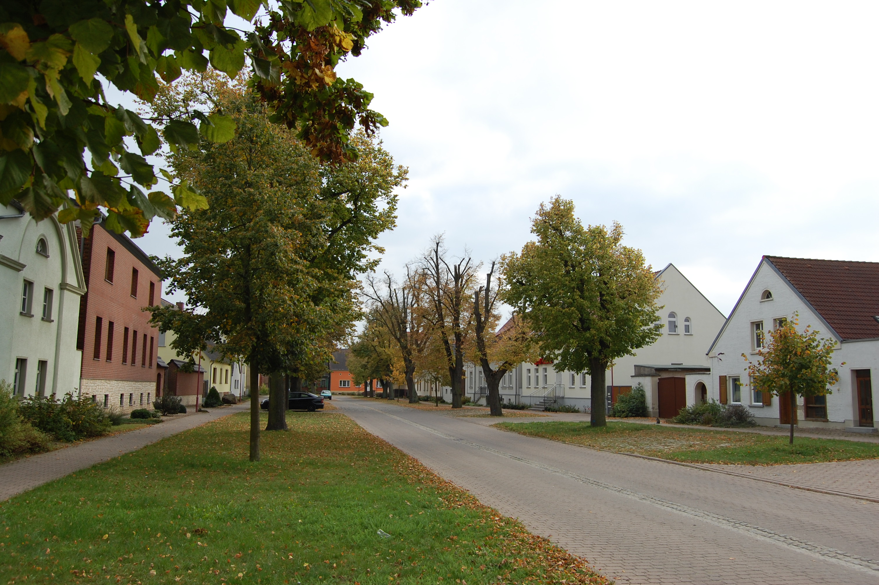 Straße in Güterglück